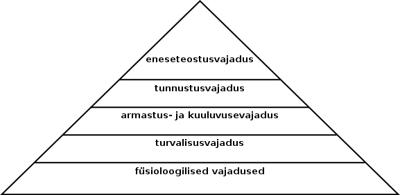 Abraham Maslowi inimvajaduste hierarhia